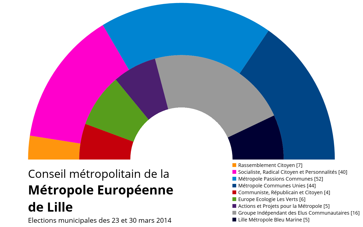 Composition du Conseil Métropolitain de la MEL :(de gauche à droite puis de l'extérieur vers l'intérieur) Rassemblement Citoyen (7) Socialiste, Radical Citoyen et Personnalités (40) Métropole Passions Communes (52) Métropole Communes Unies (44) Communiste, Républicain et Citoyen (4) Europe Ecologie Les Verts (6) Actions et Projets pour la Métropole (5) Groupe Indépendant des Elus Communautaires (16) Lille Métropole Bleu Marine (5)